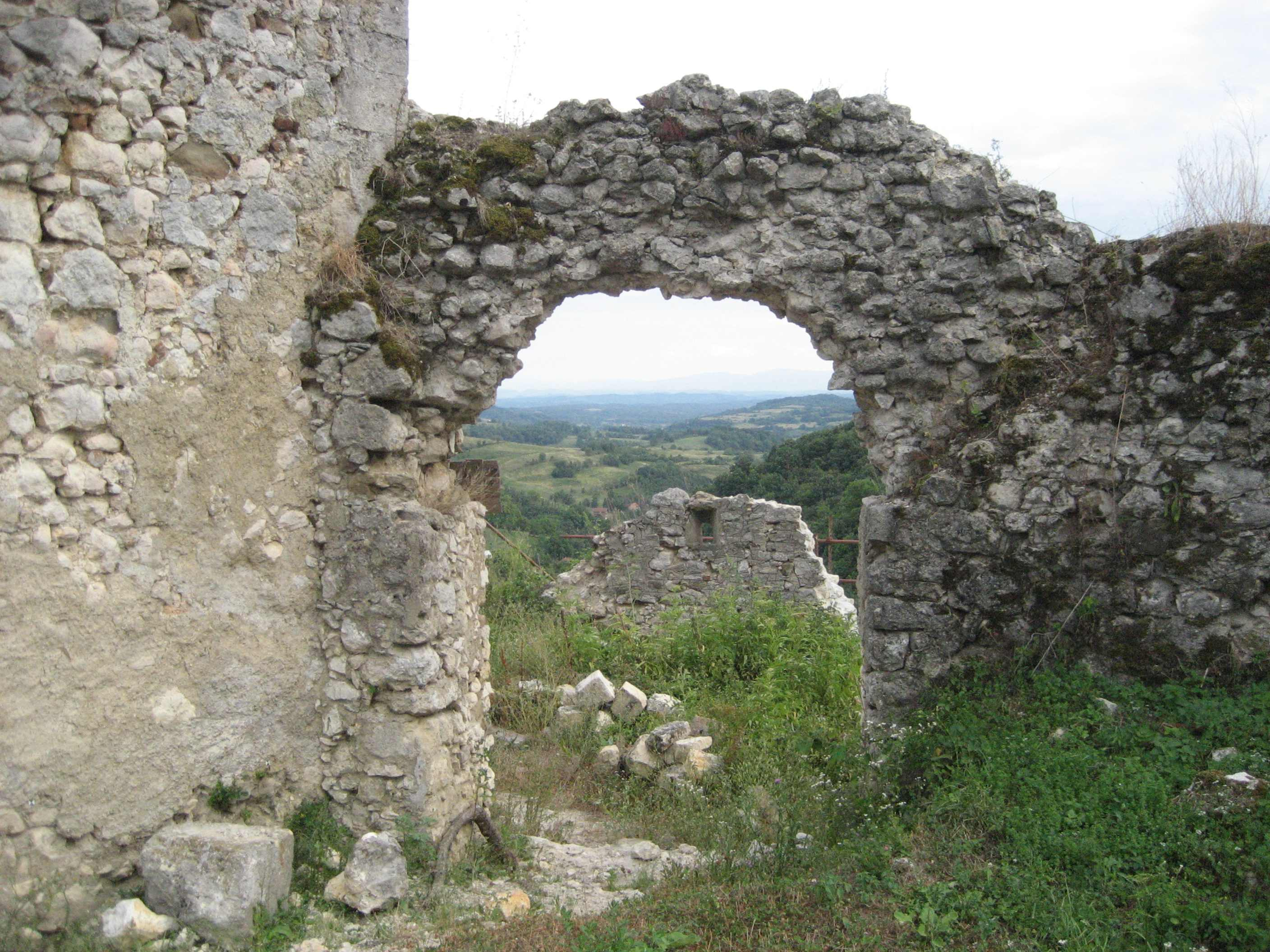 castle zrin, croatia